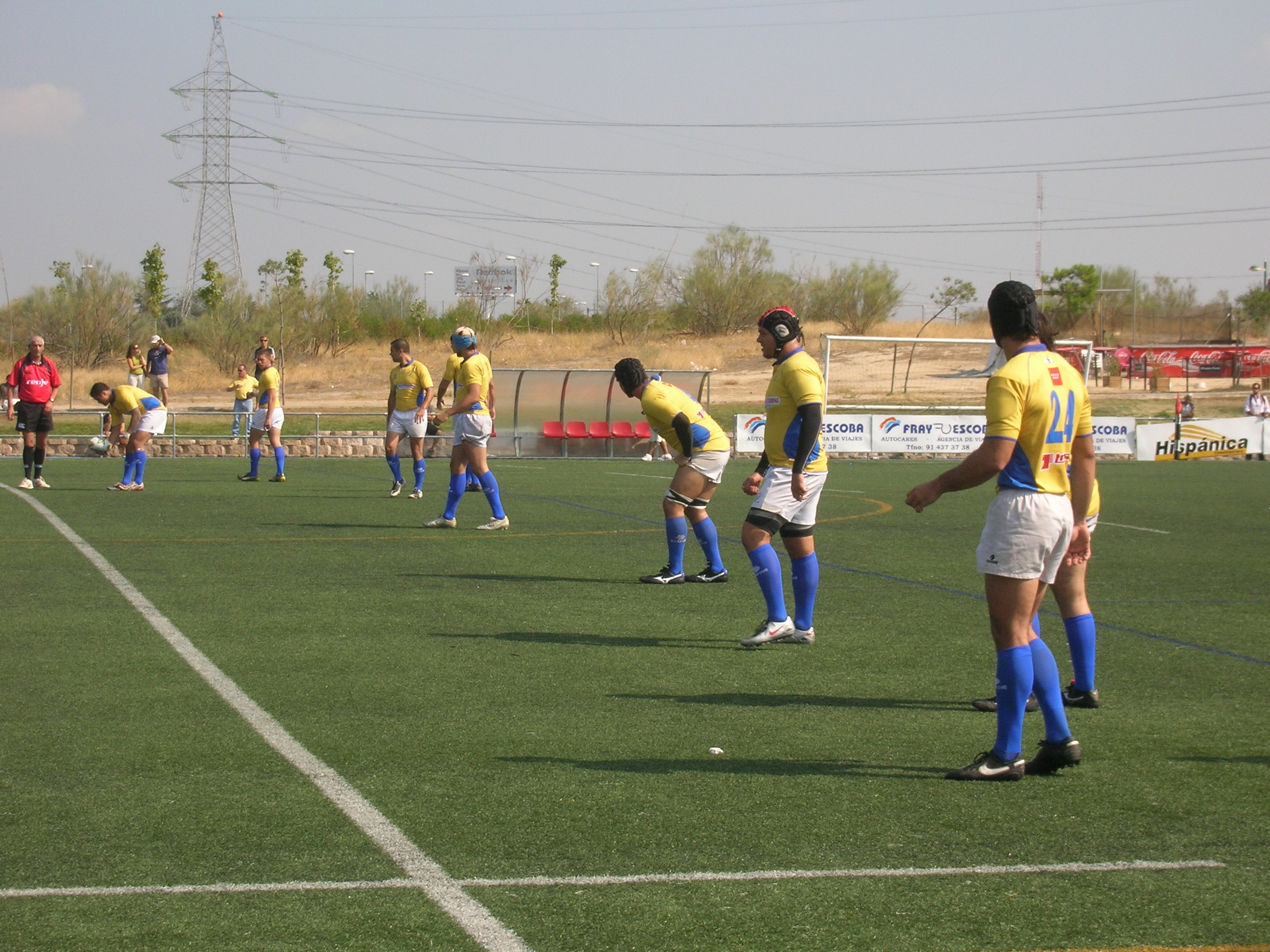 jugadores del CRC